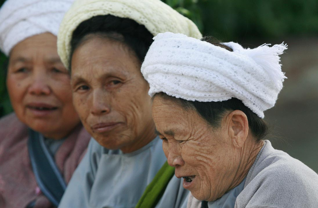 China